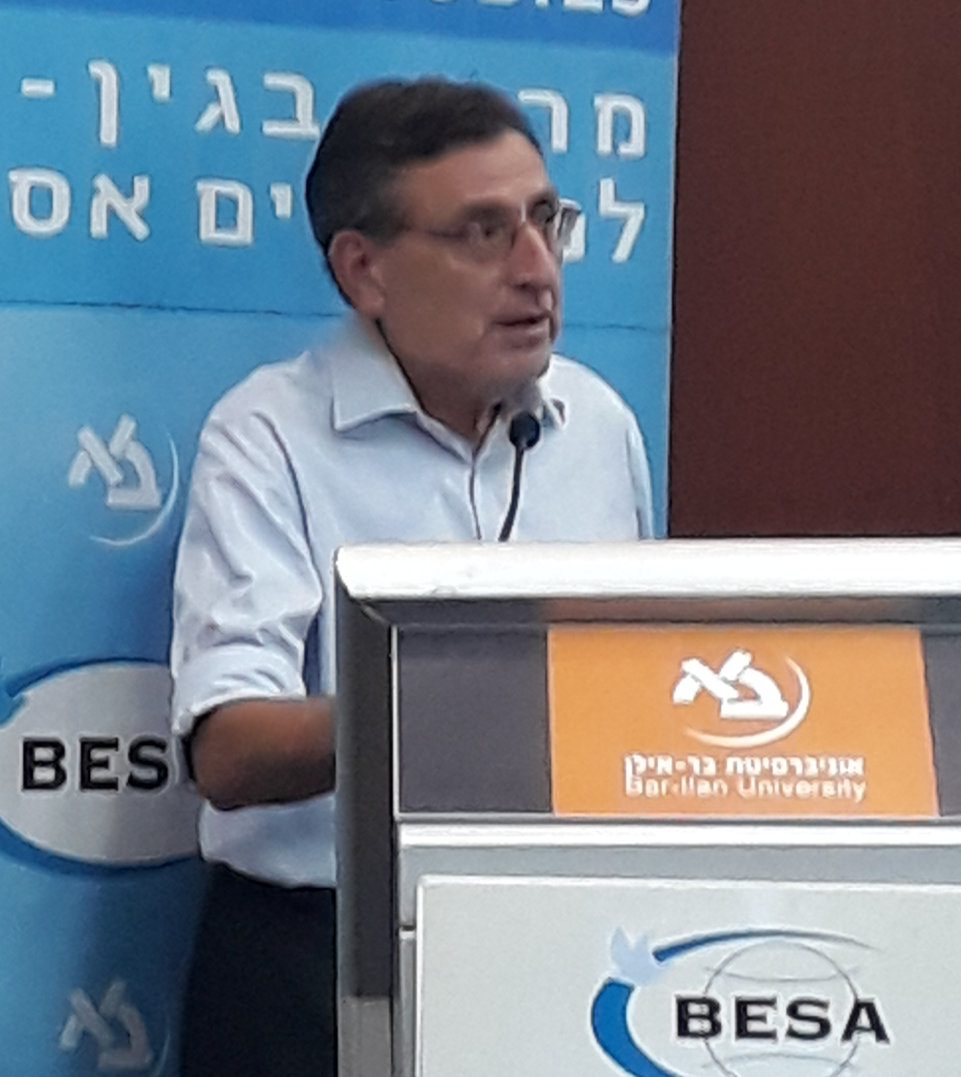 אפרים קארש מנחה יום עיון במרכז בגין סאדאת באוניברסיטת בר אילן, ספטמבר 2018